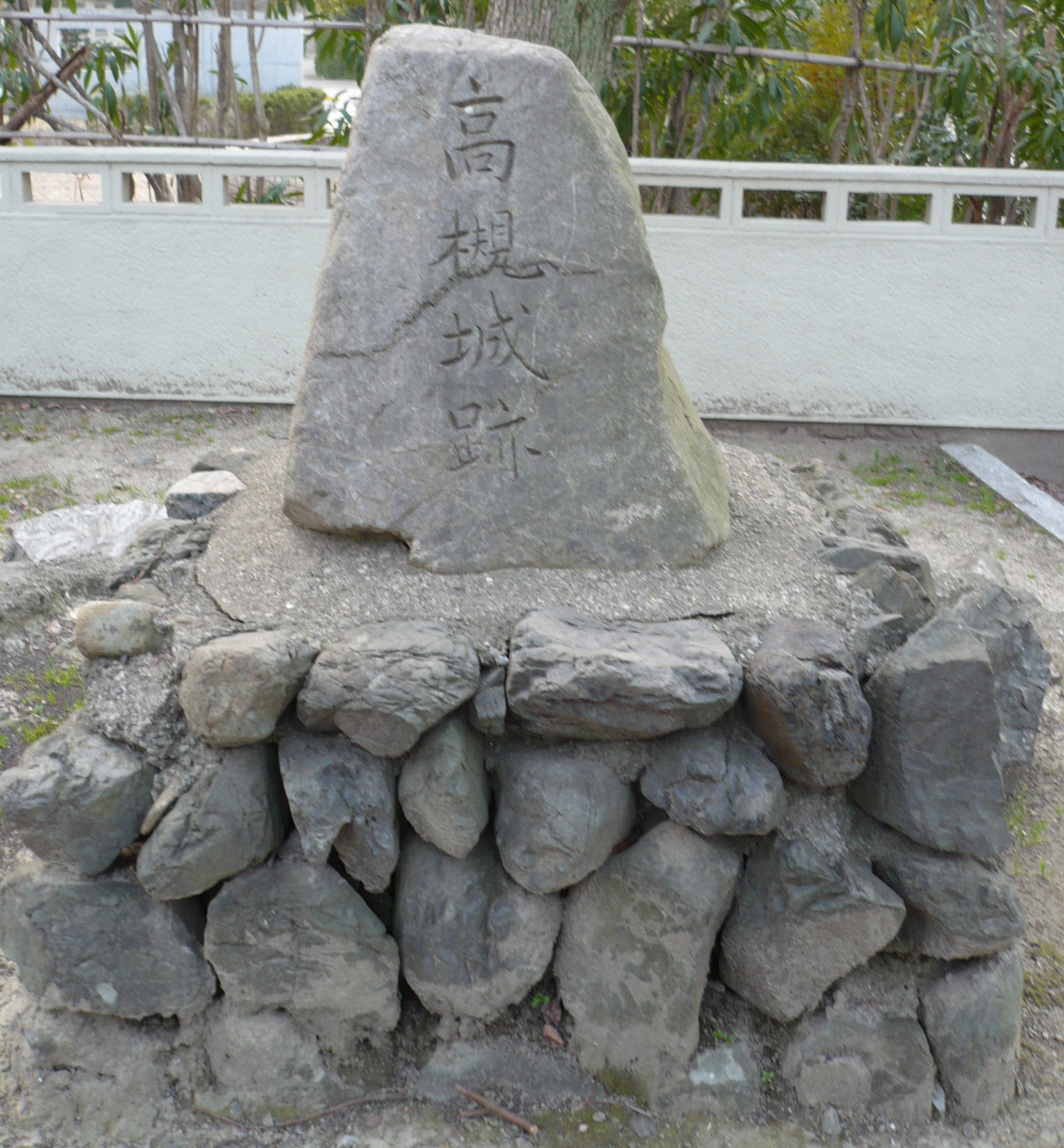 高槻城石碑